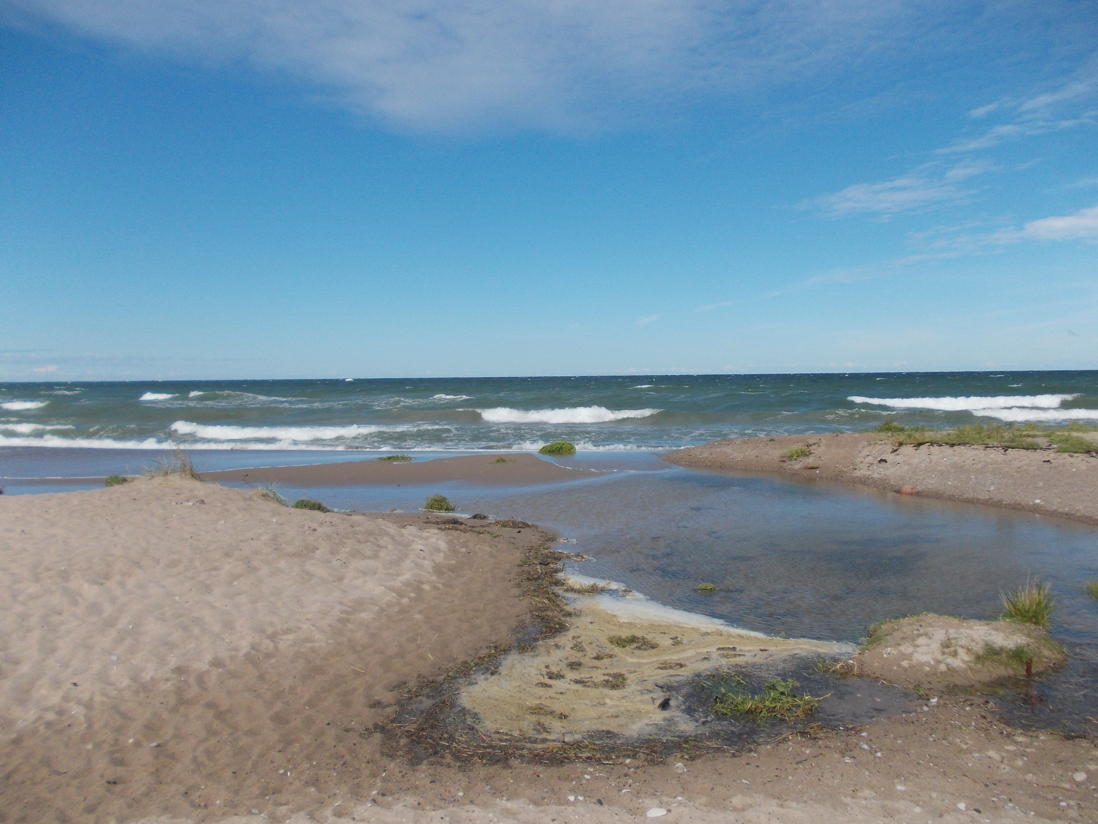 Ireån rinner ut vid Ireviks badstrand.